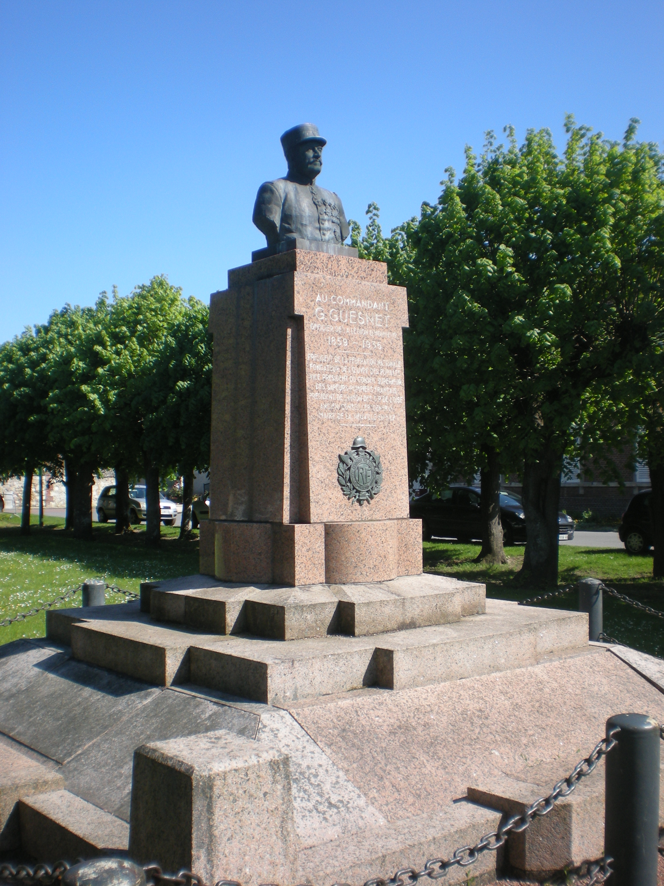 Le monument au commandant G. Guesnet (1859-1946) sur la place Verte de la Neuville-en-Hez